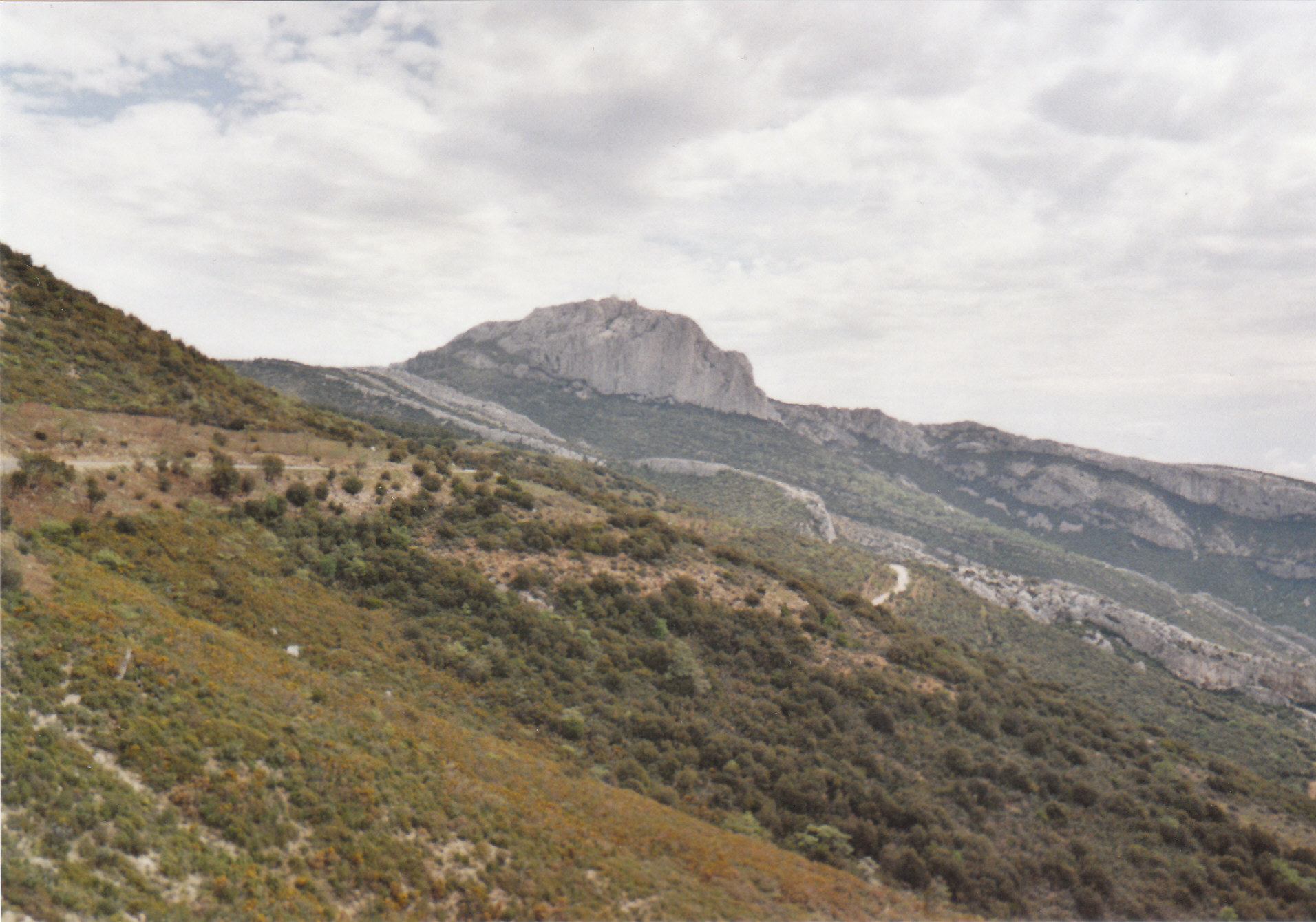 Le Pic de Bertagne vu depuis le col du Saint-Pilon